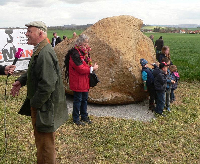 Findling von Ostermunzel am neuen Aufstellungsort, links der entdeckende Landwirt im Interview